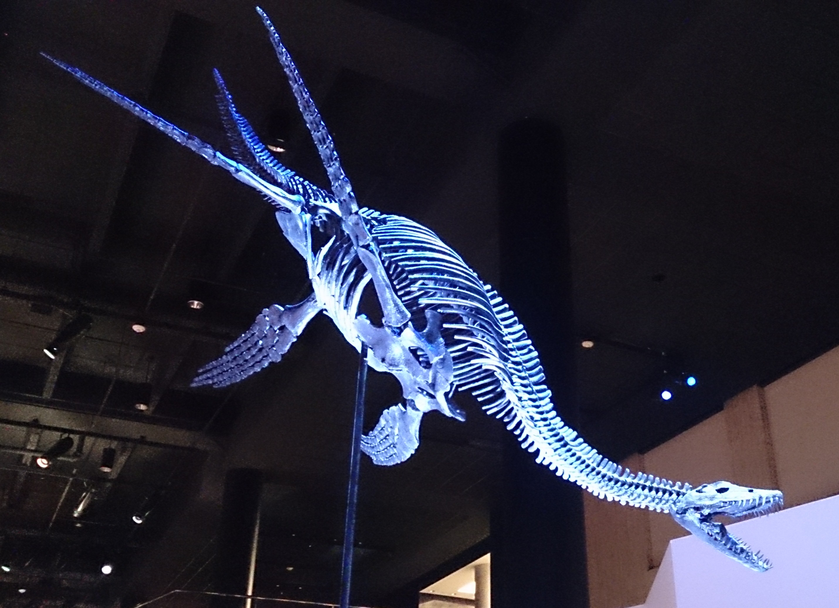 Paleo Hall at HMNS